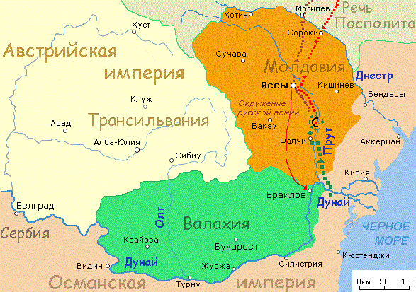 Prutski campain of russian tsar Peter I in Moldova in 1711 (Прутский поход 1711 года)